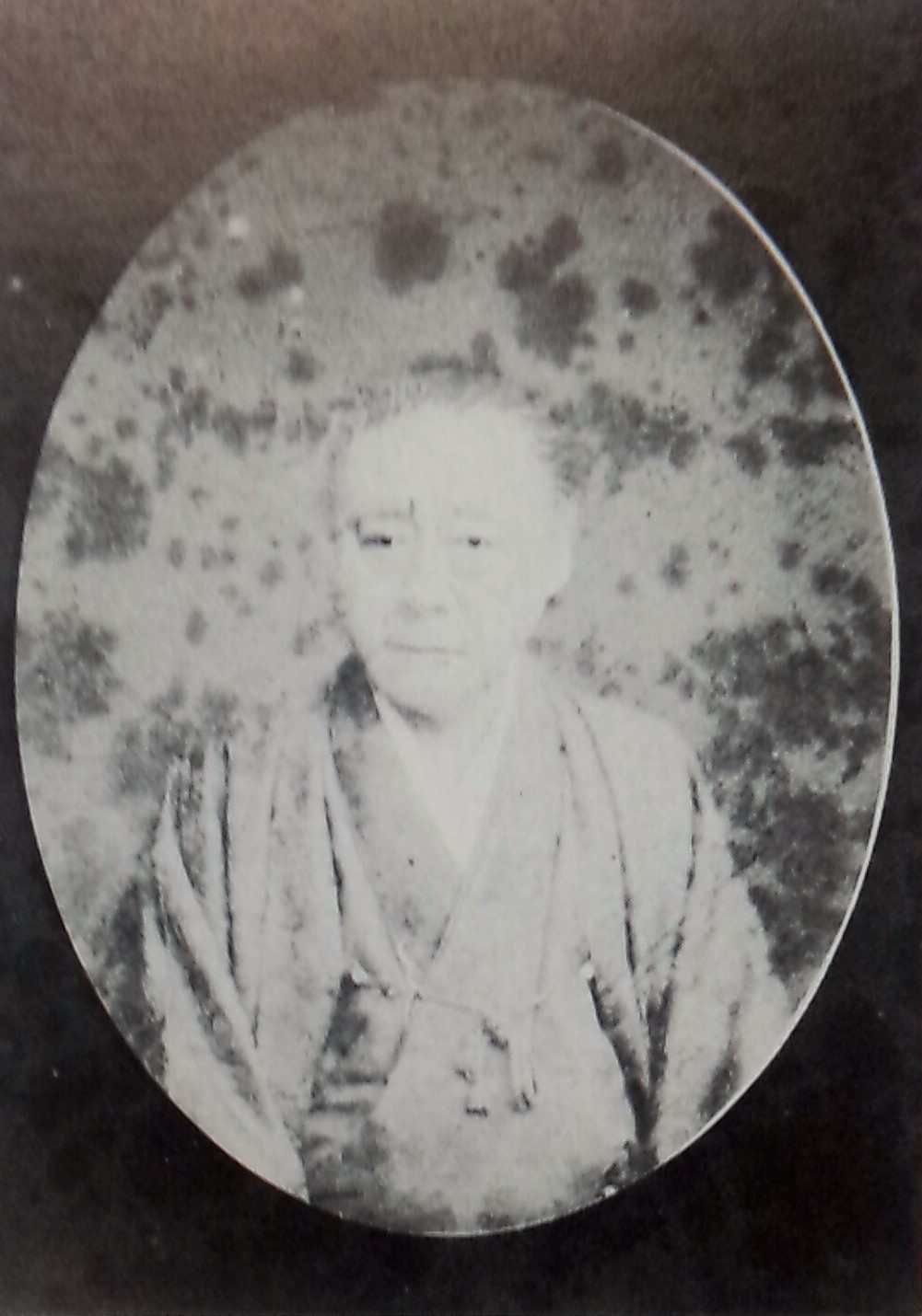 澤為量の肖像写真。